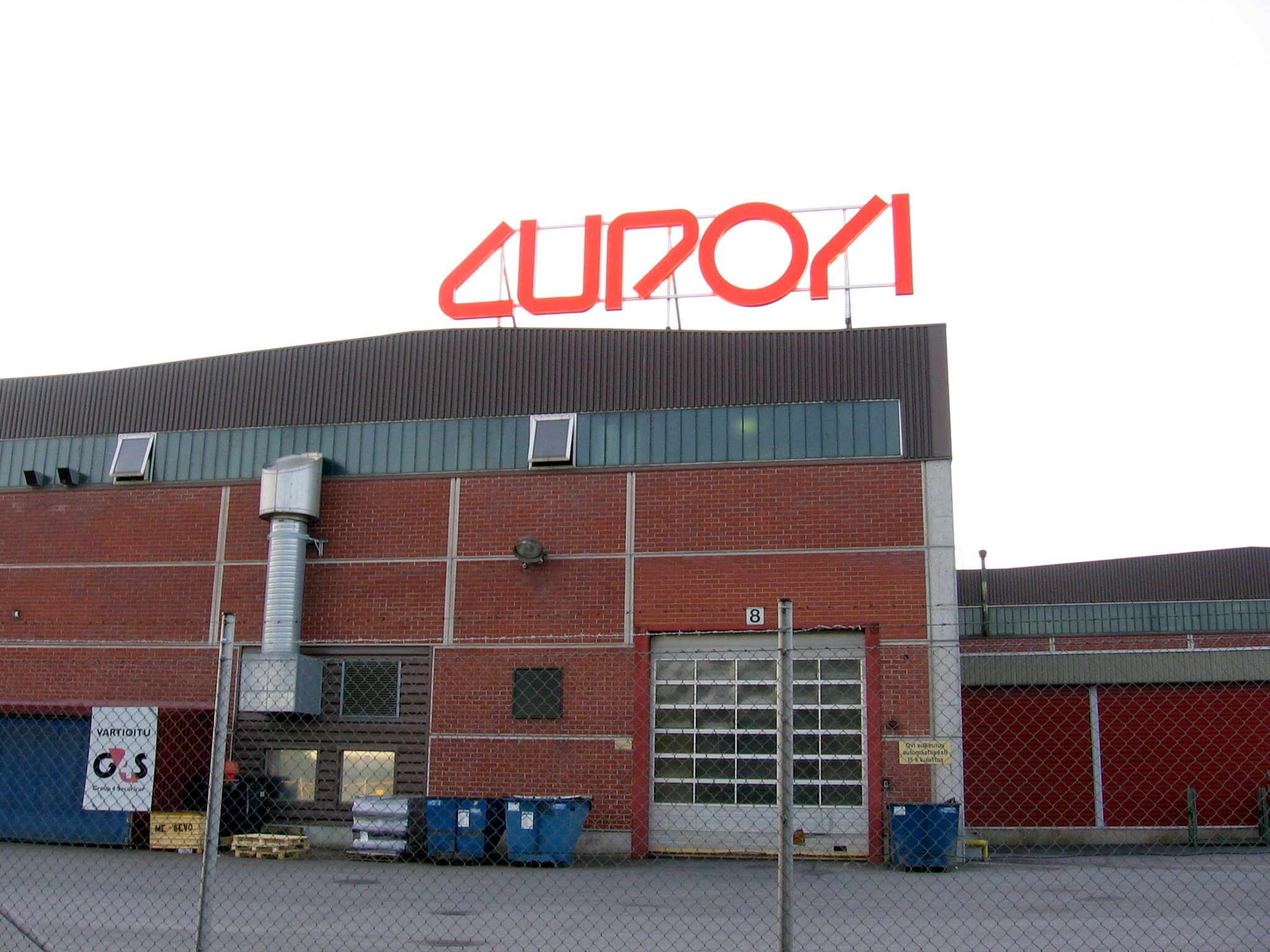 Cupori (Pori)